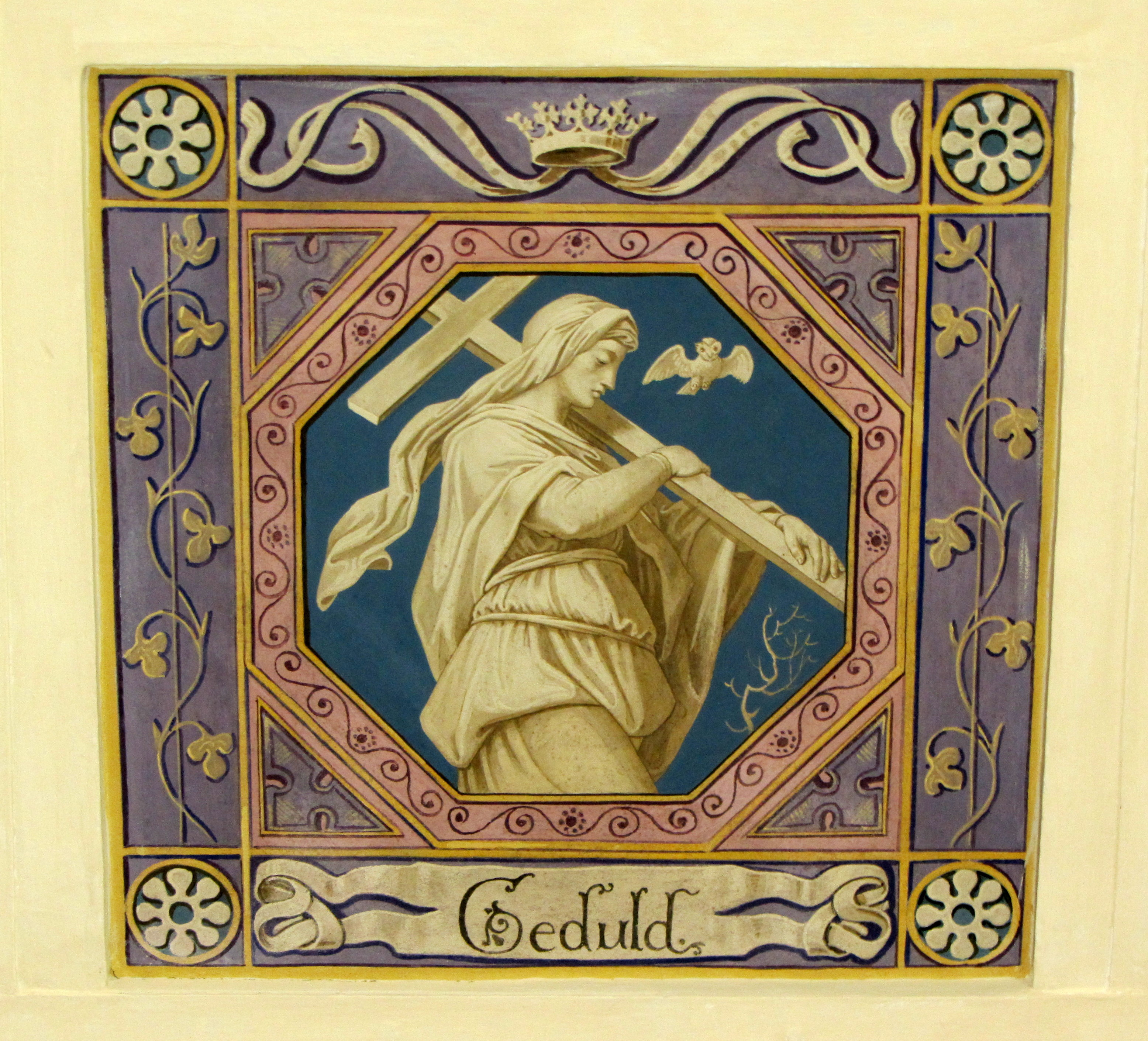 Maria im Busch - Deckenfresken